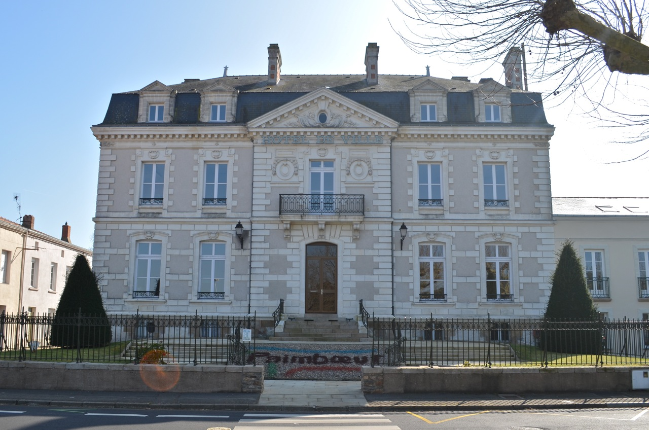 Mairie de Paimbœuf - Loire-Atlantique, France